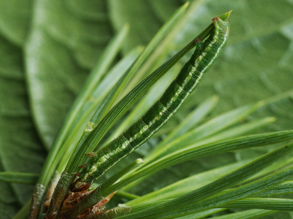 Exemplar found: Russia, Moscow Oblast, Odintsovsky District, near village Pestovo, 24.07.2015, on scots pine (Pinus sylvestris), days МО, Одинцовский р-н, окрестности деревни Пестово, 24.07.2015, на сосне, днём